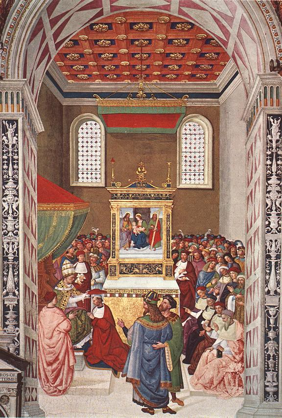 PINTURICCHIO Piccolomini Receives the Cardinal Hat Fresco Piccolomini Library, Duomo, Siena